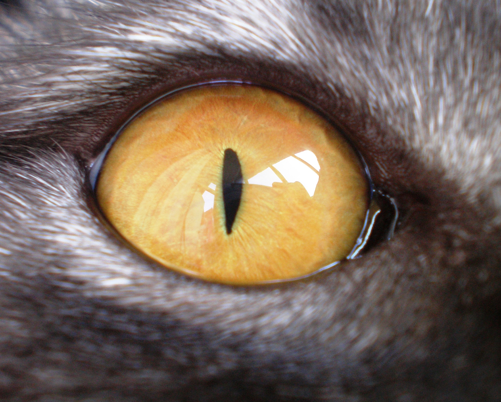 Глаз кота